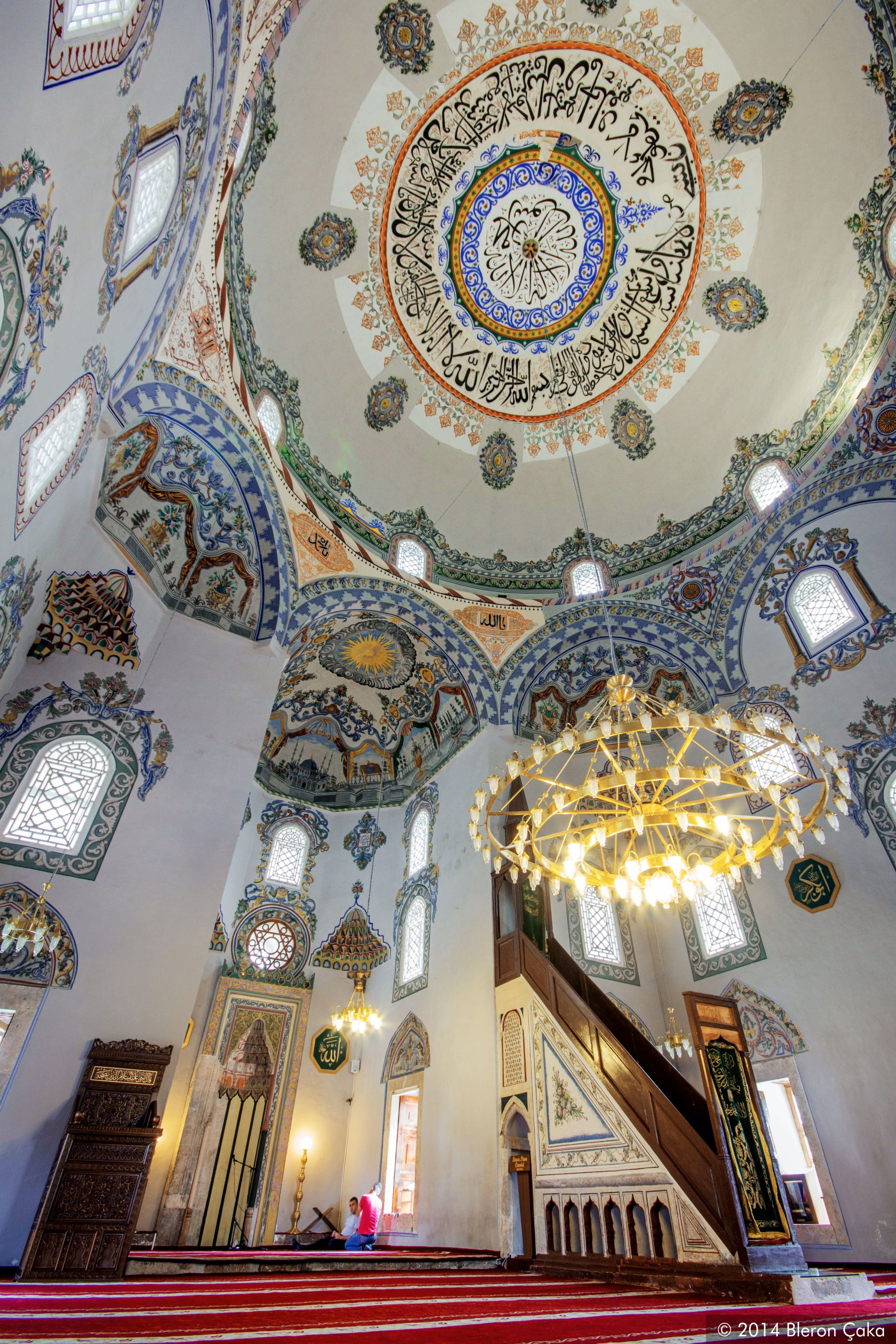 Xhamia e Sinan Pashës